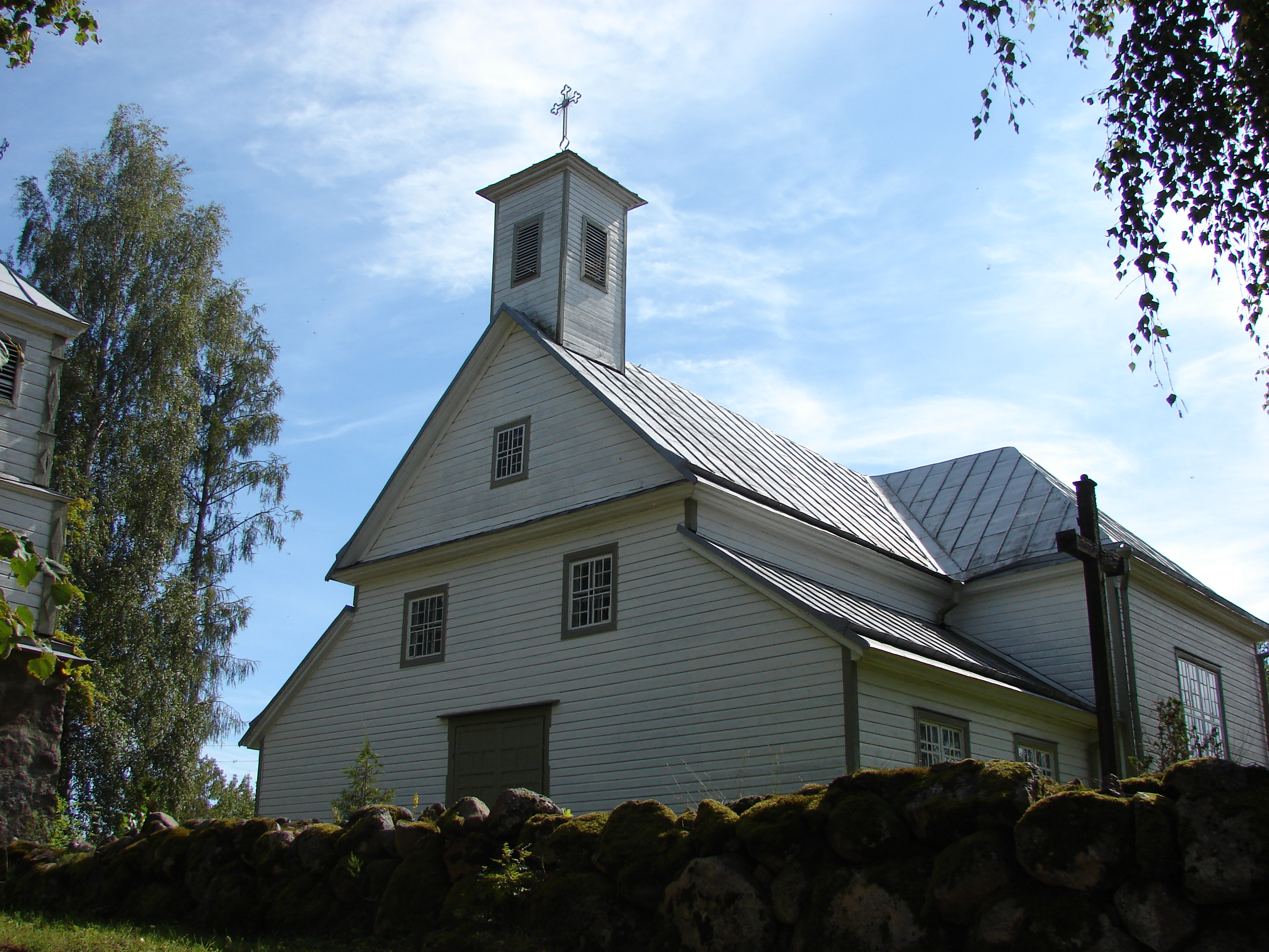 Skaistas Sv. Jaunavas Marijas Romas katoļu baznīca, Skaistas pagasts, Krāslavas novads, Latvia